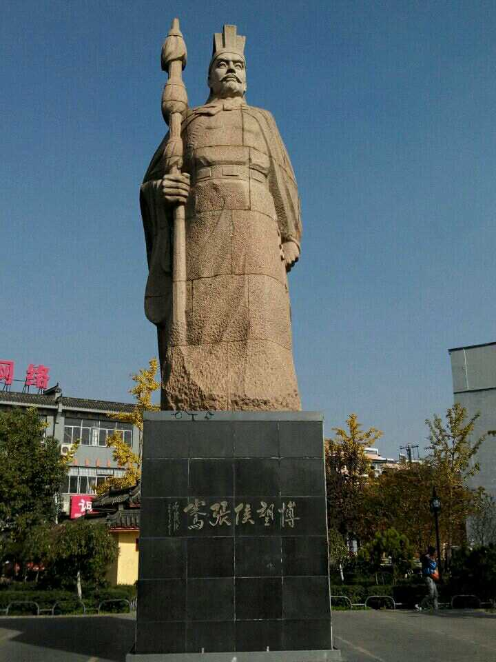 张骞像，位于陕西省城固县